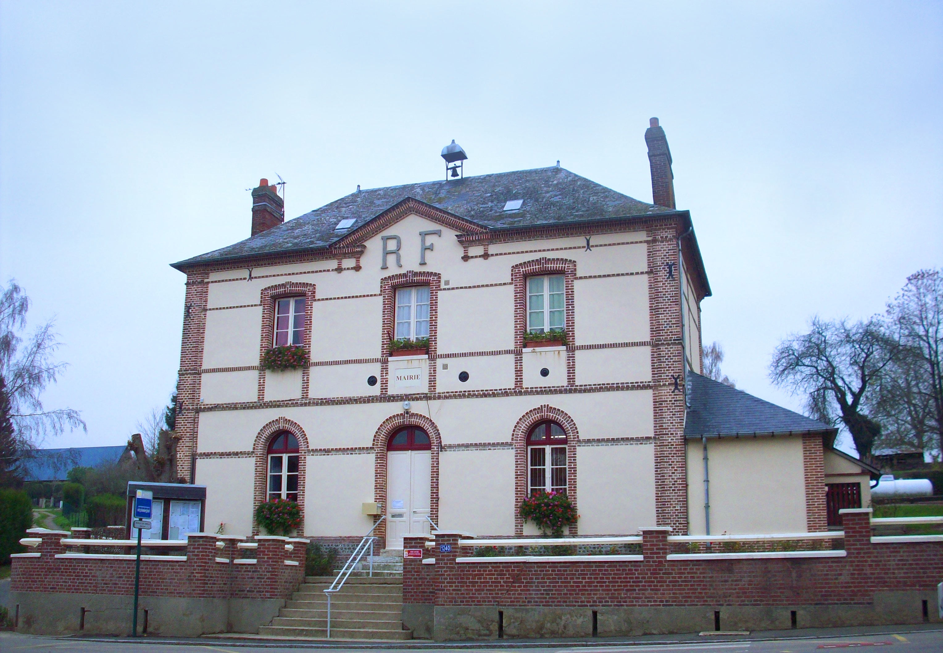 Mairie de Morville-sur-Andelle.